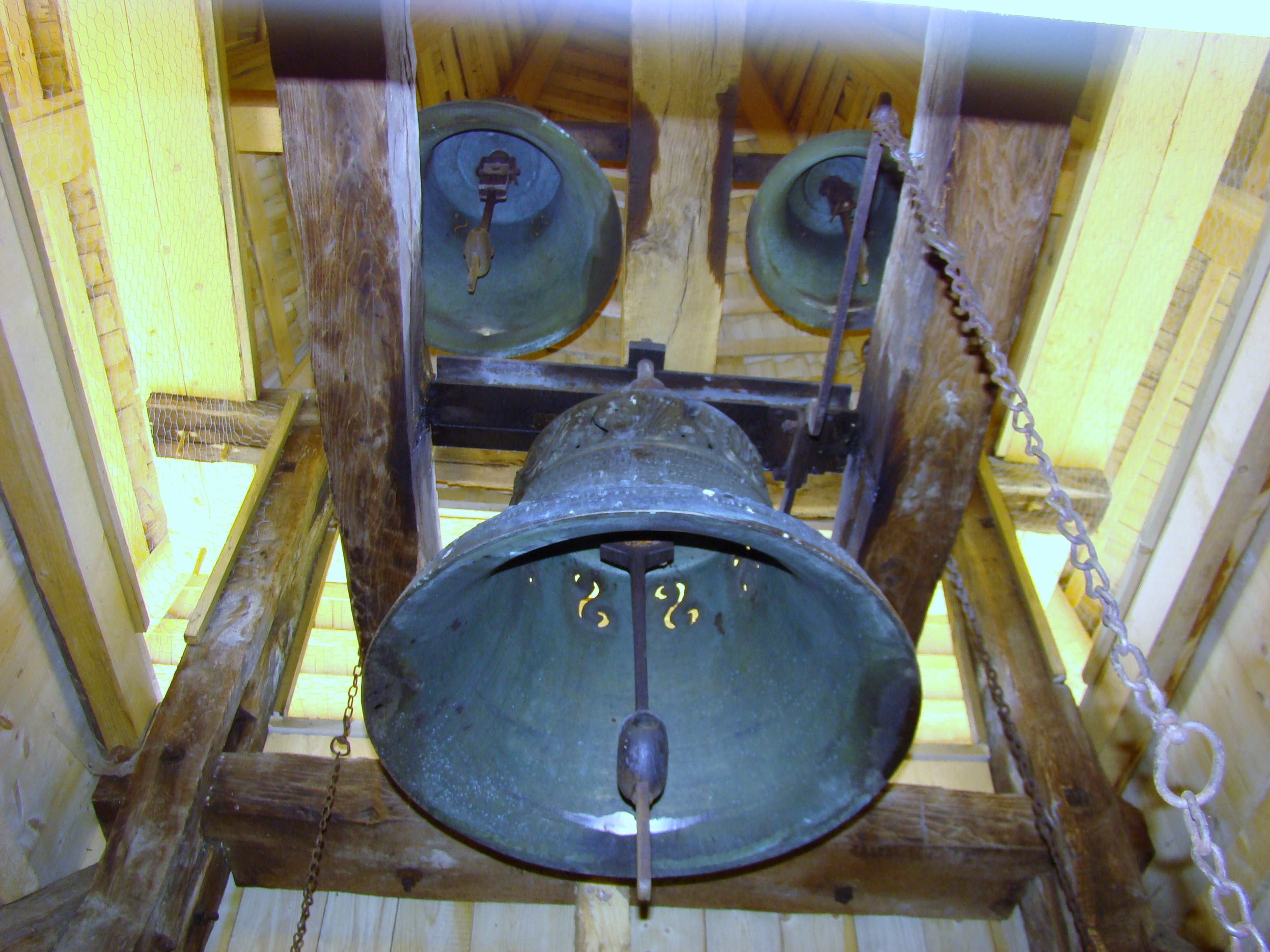 Biserica de lemn "Sfântul Nicolae" (a Nistoreştilor) , oraş SĂLIŞTEA DE SUS